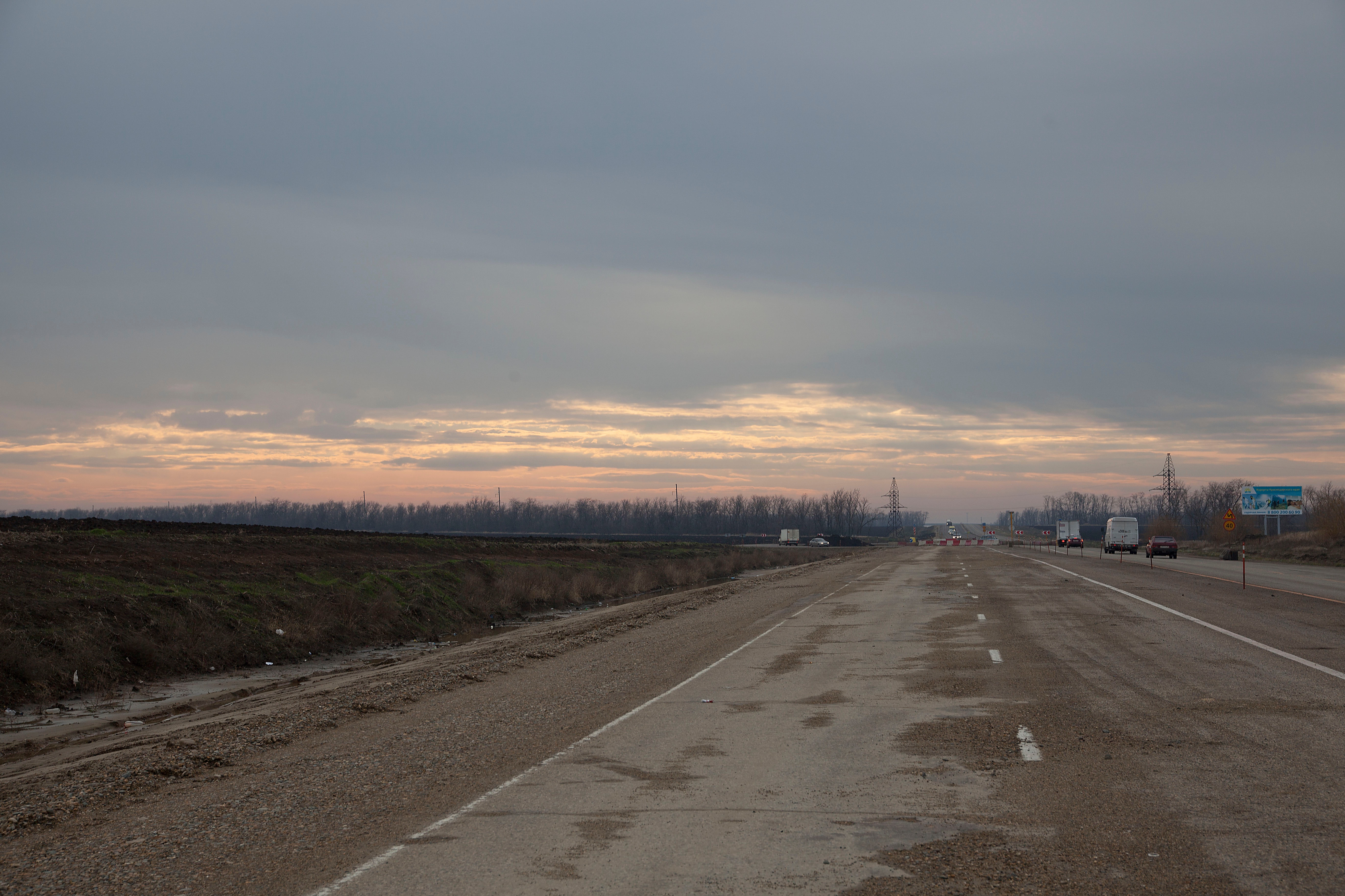 М4-Дон в Краснодарском крае